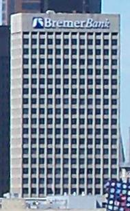 Bremer Tower